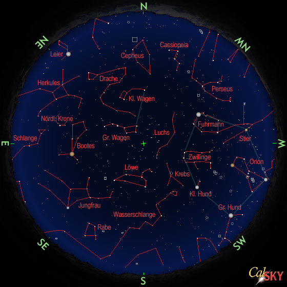 Sternhimmel im Frühling (50° Breite, Mitte April 21 Uhr) Berechnet mit Programm calSKY, siehe z. B. Geof 23:34, 23. Dez 2005 (CET)